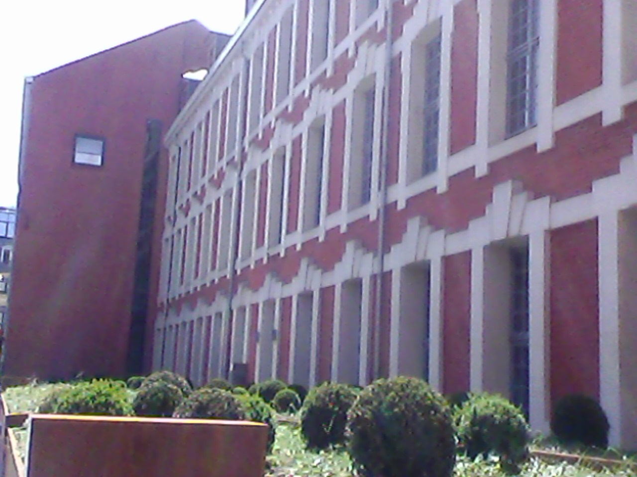 Hôtel du Lombard, vue vers le 4 rue du Lombard, Lille, France